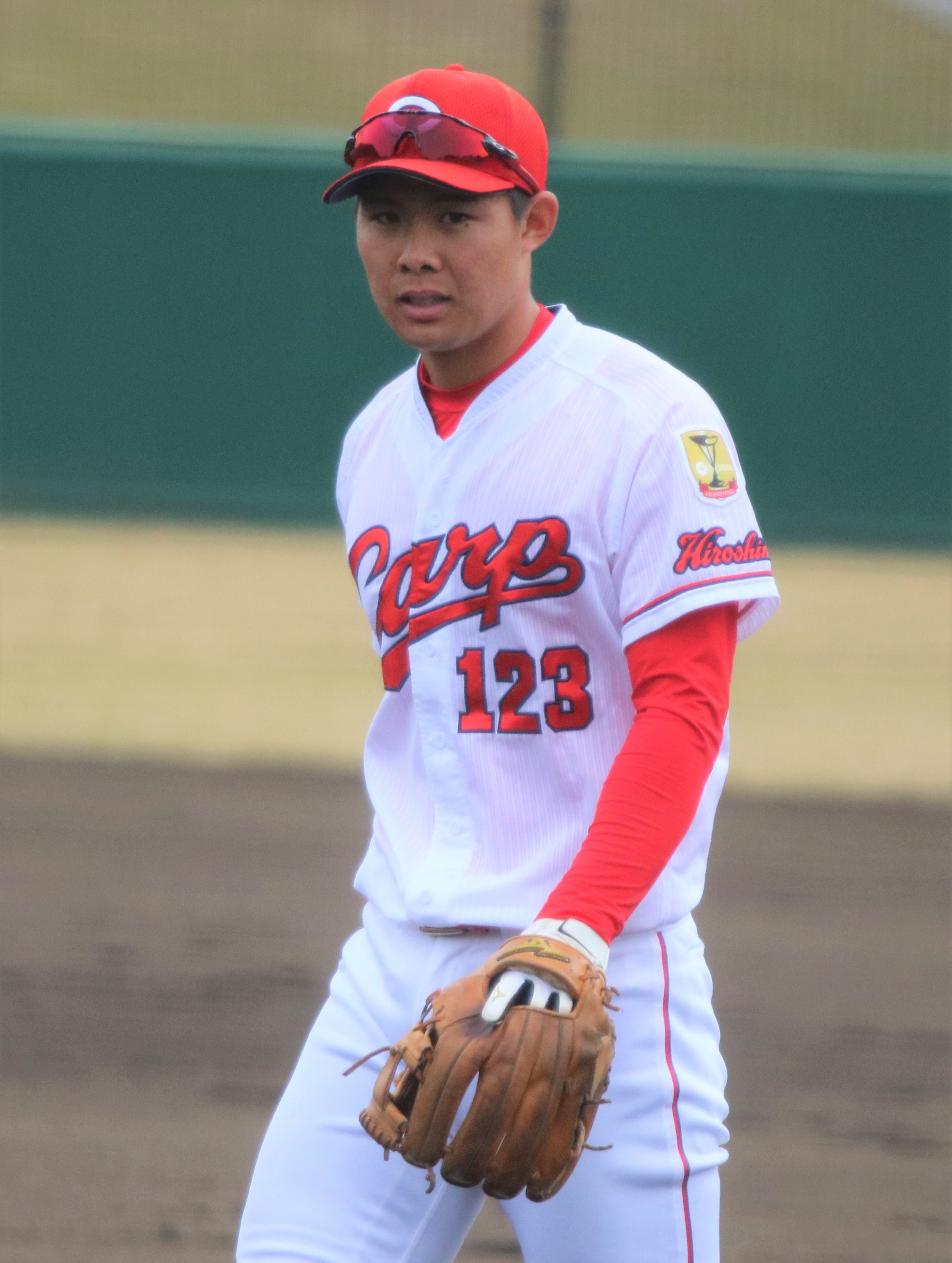 2017/11/20 由宇練習場